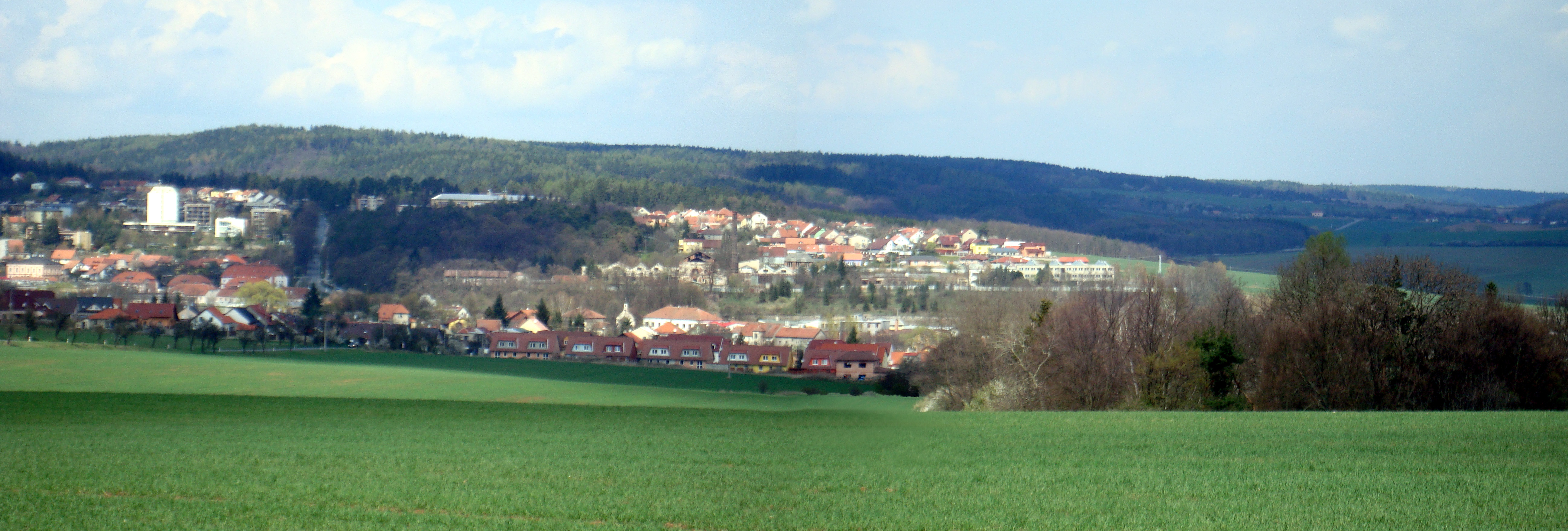 Zastávka panorama na dolní okraj zástavby v popředí - ulice Růžová je součástí Babic u Rosic